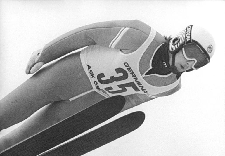 ADN-ZB Thieme 31.1.89 Oberwiesenthal: 41. DDR-Skimeisterschaften Der 84er Olympiasieger Jens Weißflog (SC Traktor) sicherte sich in seiner Heimatstadt in beeindruckender Manier den Meistertitel auf der Normalschanze mit Sprüngen von 92,5 und 93 Meter und der Note 242,6.